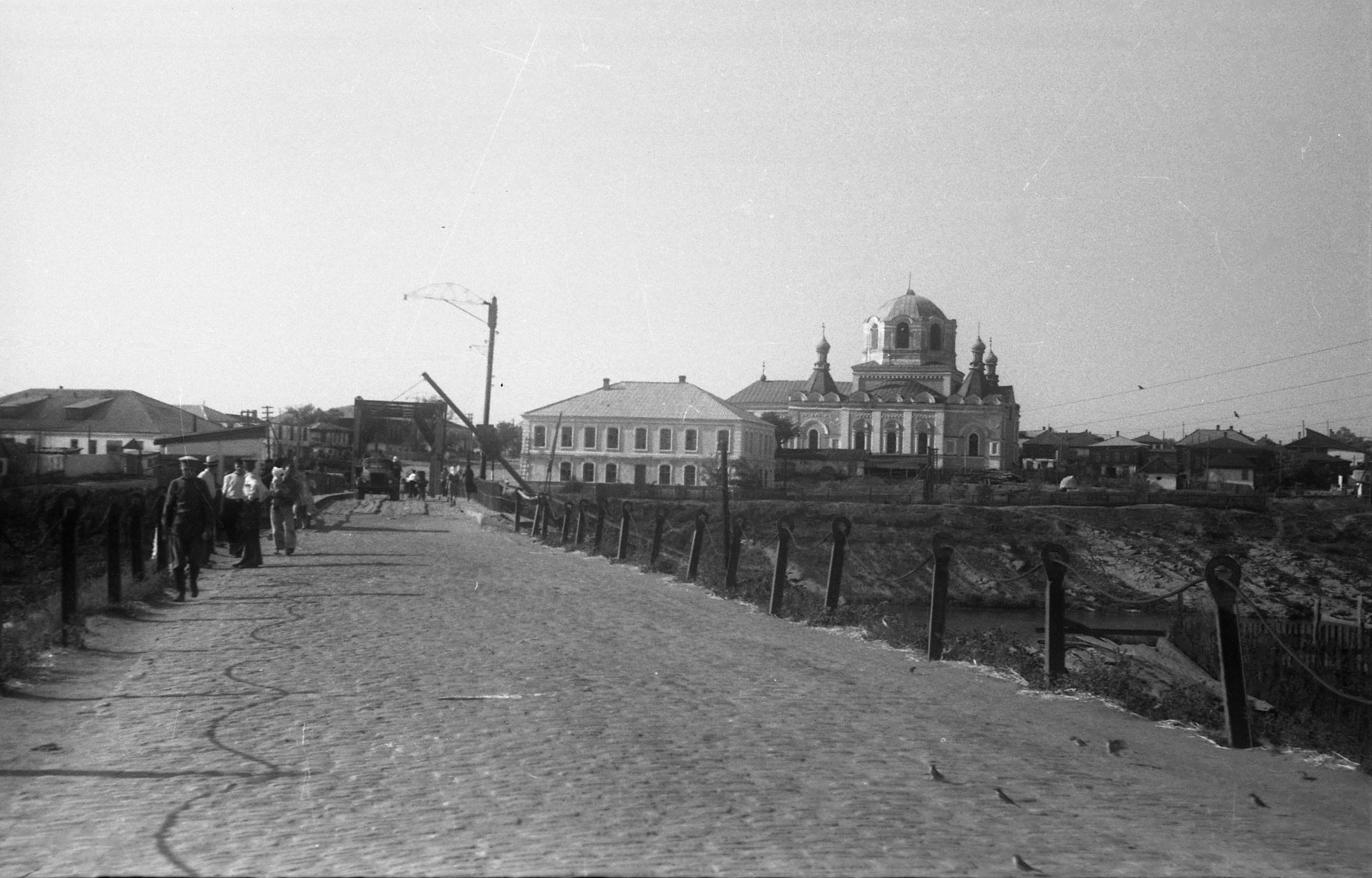 Ретро